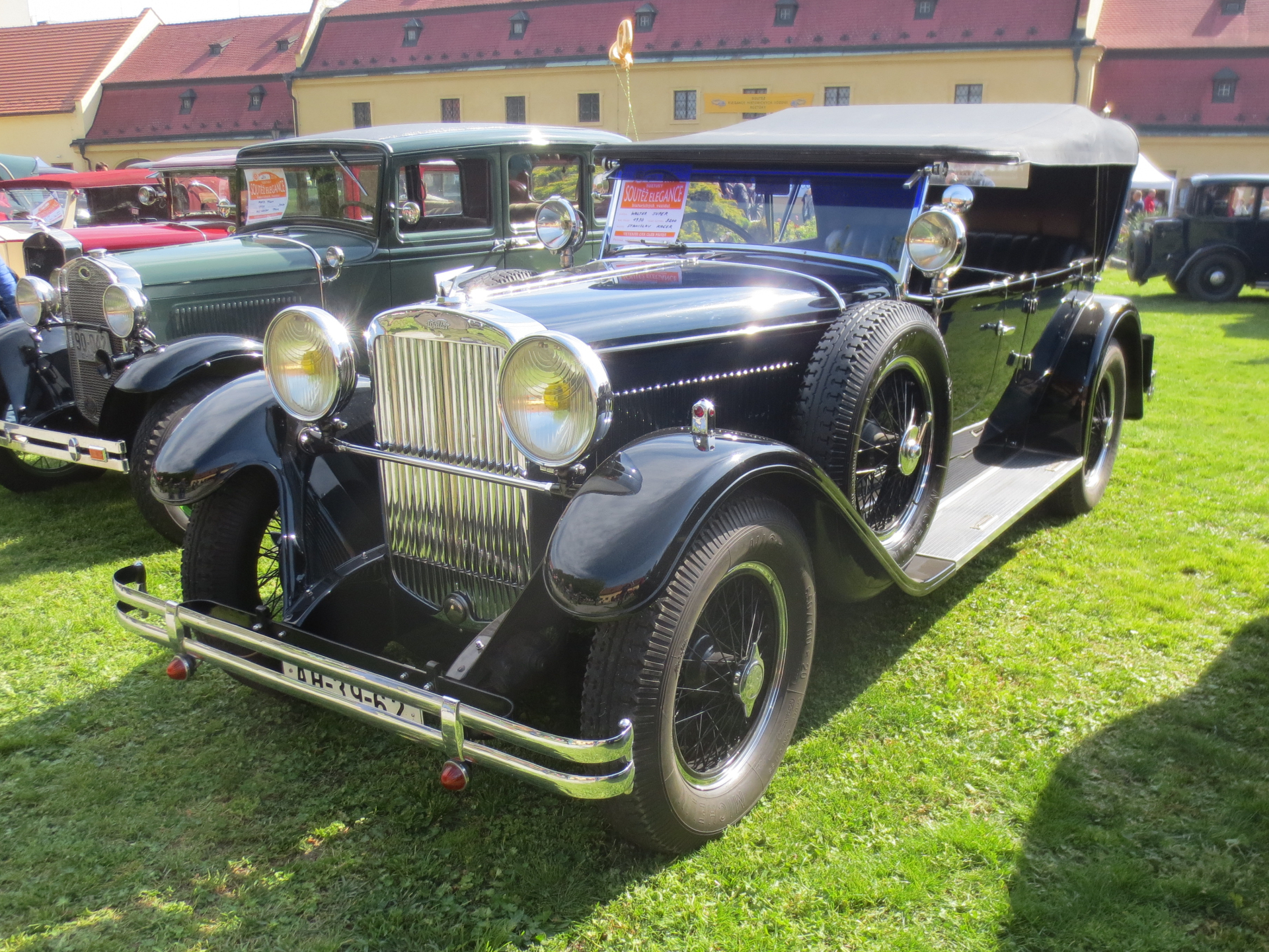 Walter Super 6, touring (1930), Roztoky 2019